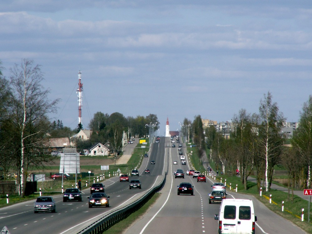 Šiauliai nuo Lieporių